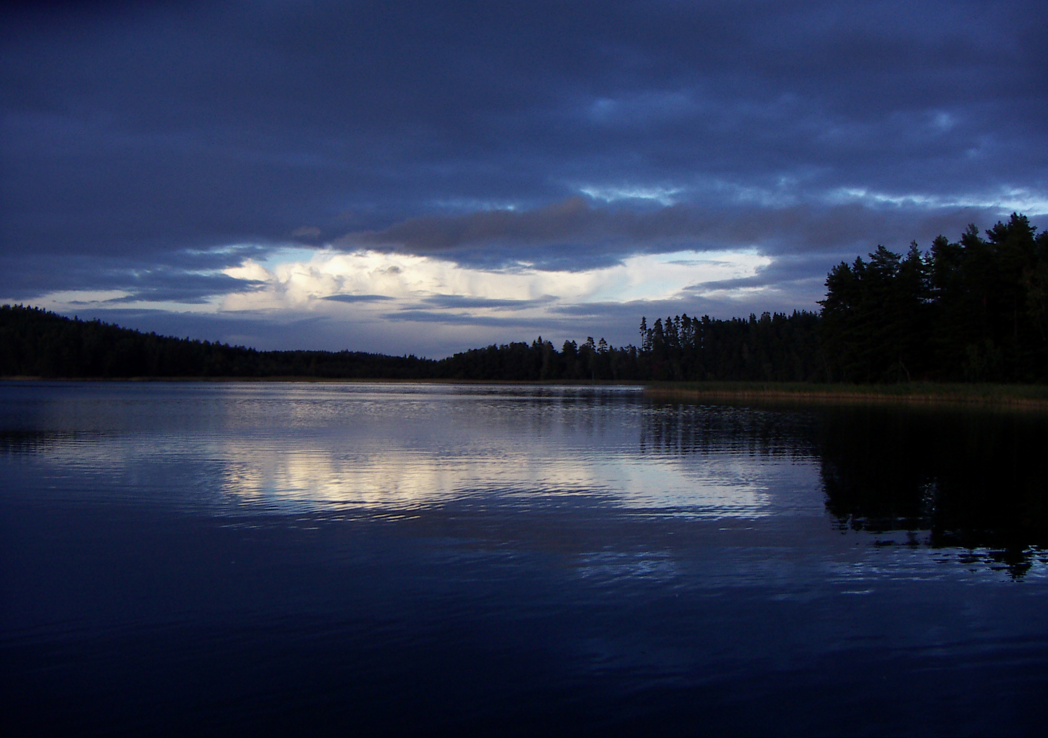 Bild över Båven, tagen från Hornet mot klubben